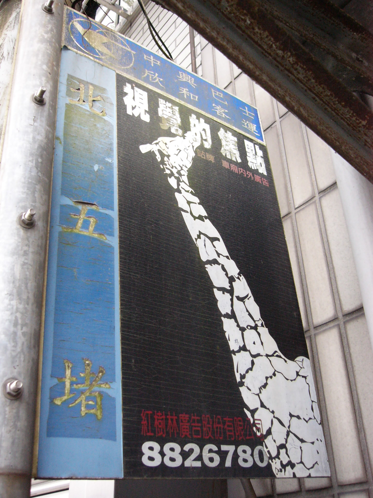 中文（台灣）: 1990年代的中興巴士與欣和客運「北五堵」站牌正面，位於基隆市七堵區明德三路，現已拆除。